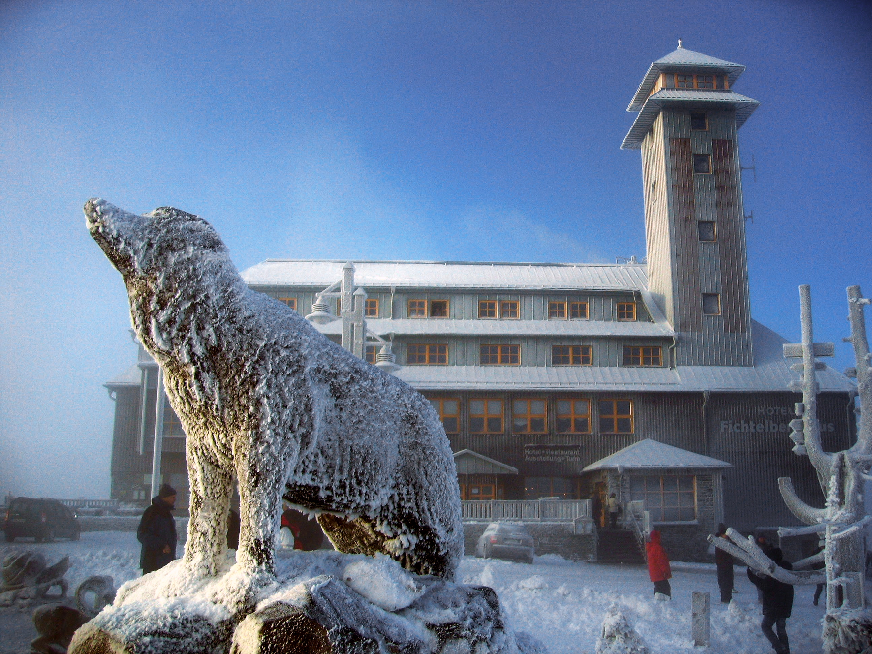 Oberwiesenthal - Das Fichtelberghaus im Schnee